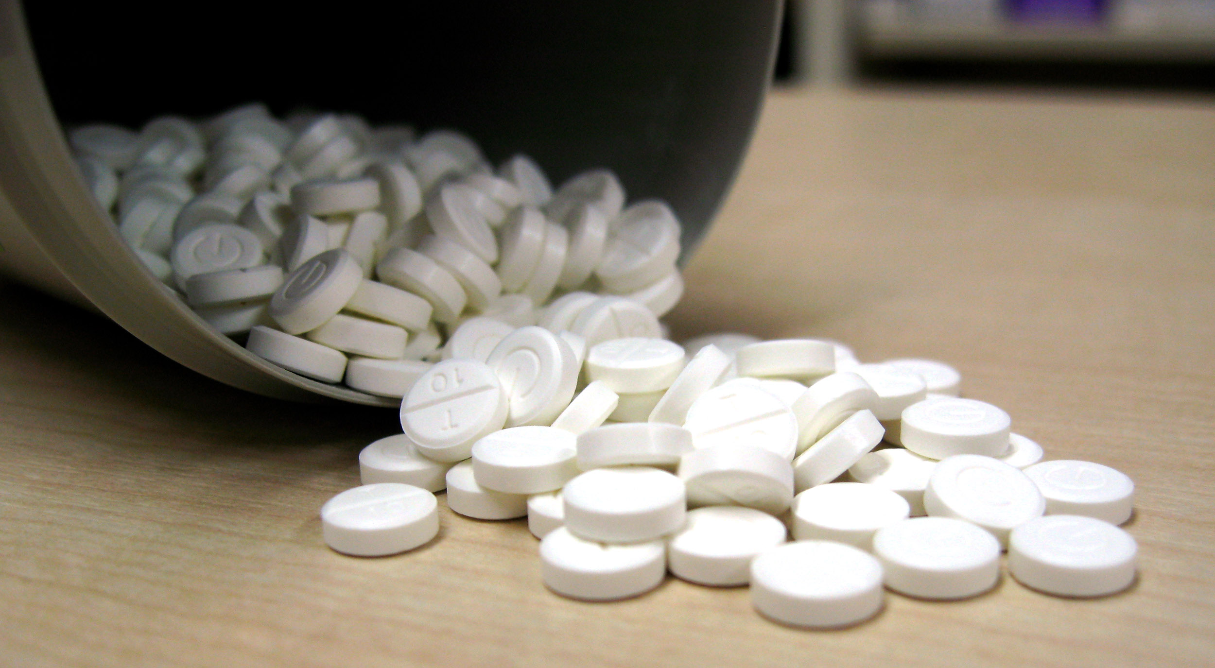 Temazepam 10mg tablets-1